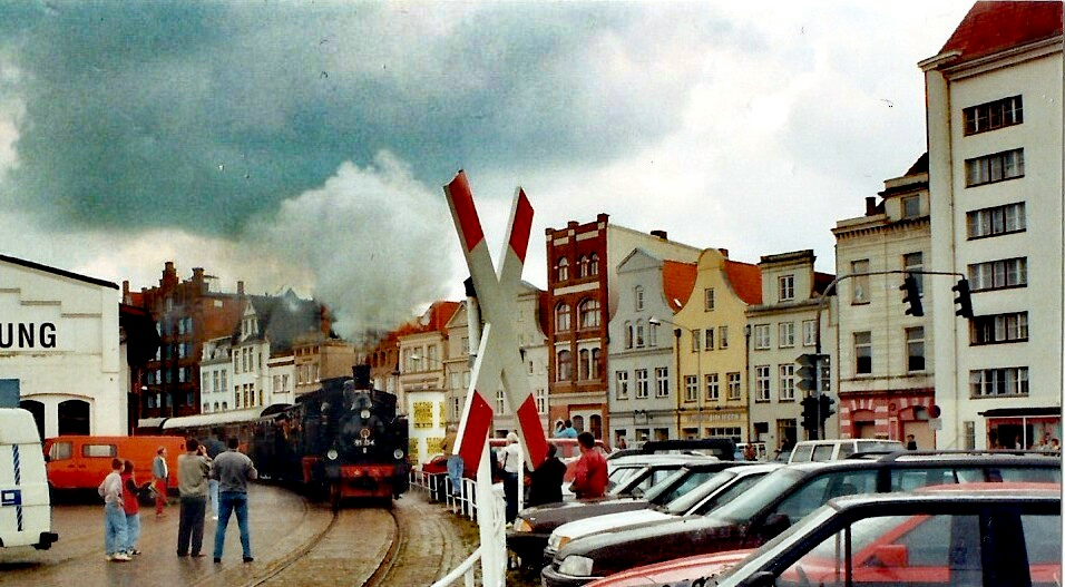 10. Lübecker Altstadtfest. Die Dampflok 91 134 (Preußische T 9.2) befährt die Gleise der Lübecker Hafenbahn An der Untertrave